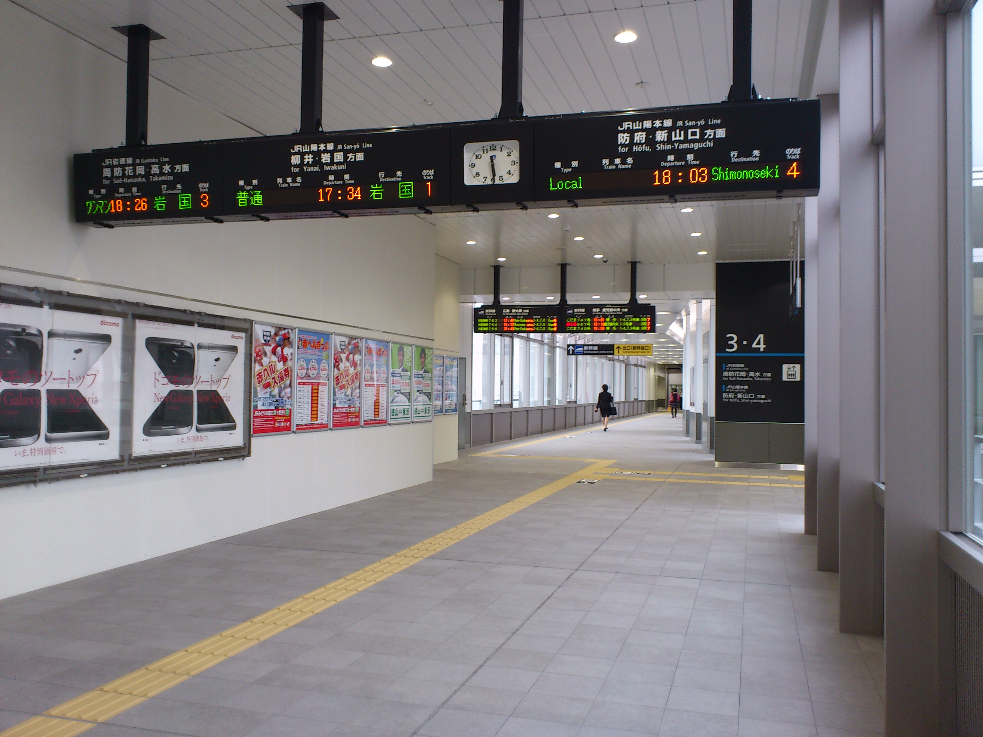 徳山駅新跨線橋